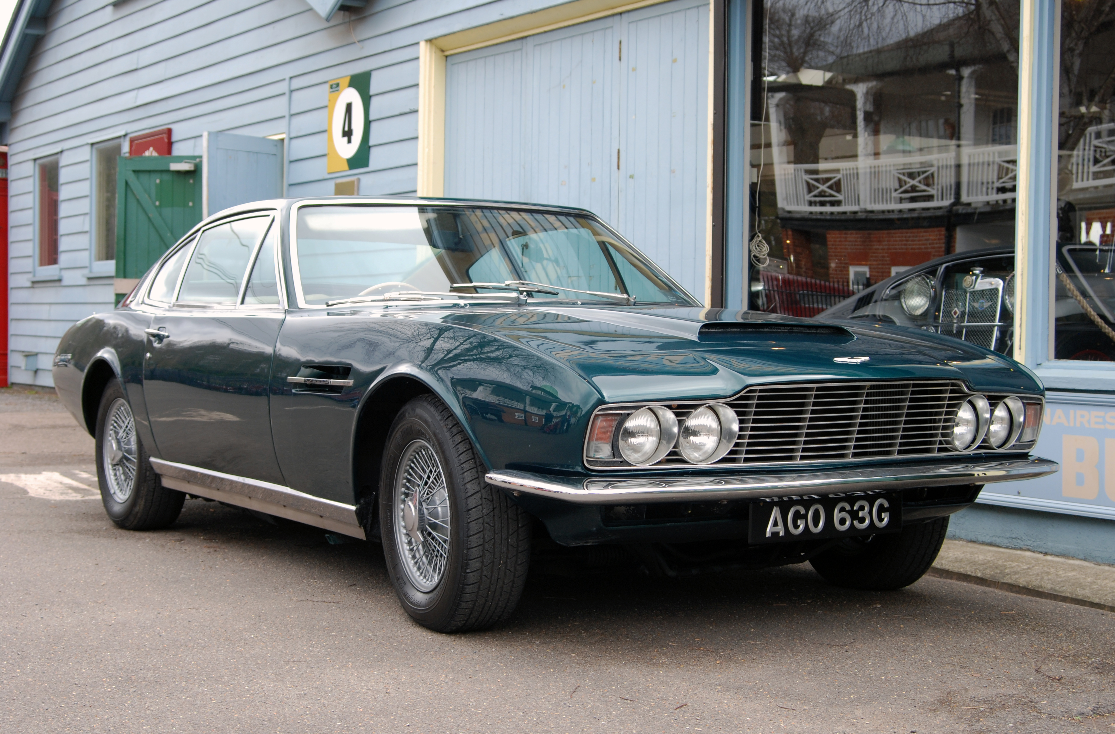 Brooklands,Mar 2009